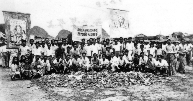 廣西大學數理化學系反內戰大遊行